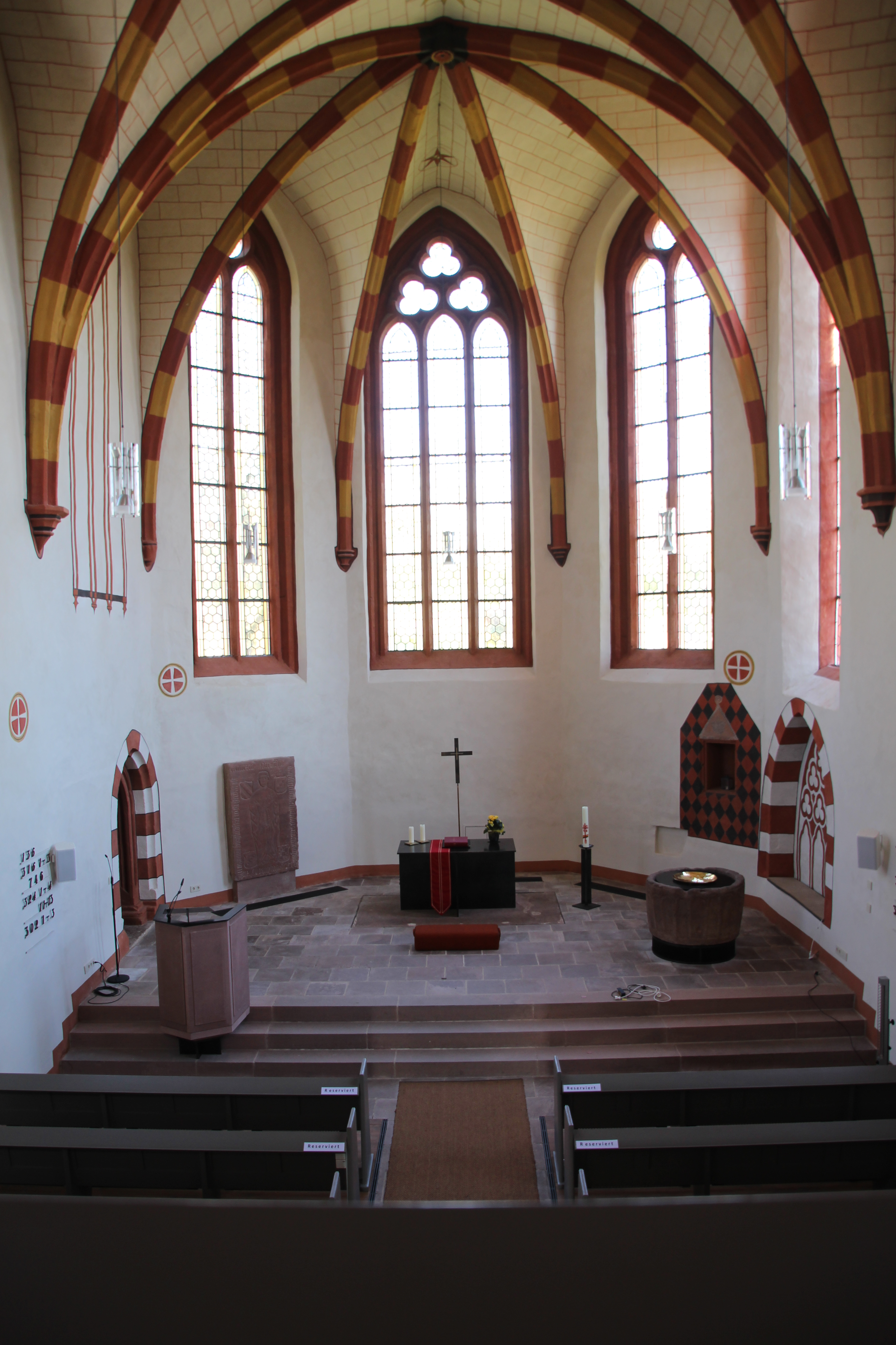 Rüdigheim (Neuberg)